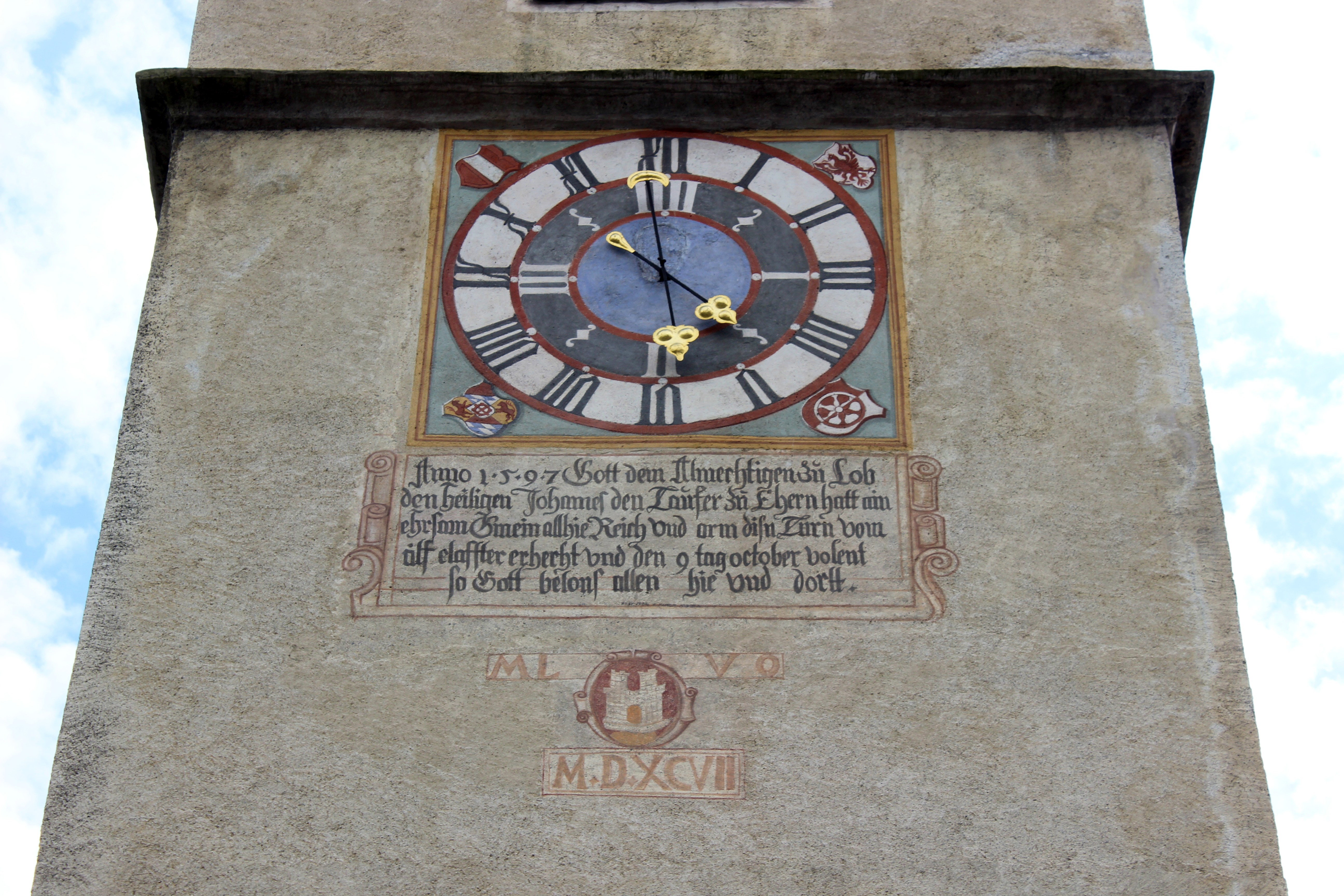 Turmuhr der Pfarrkirche St. Johannes der Täufer in Kortsch